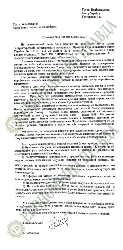 Лист І.Коломойського та Г.Боголюбова до НБУ